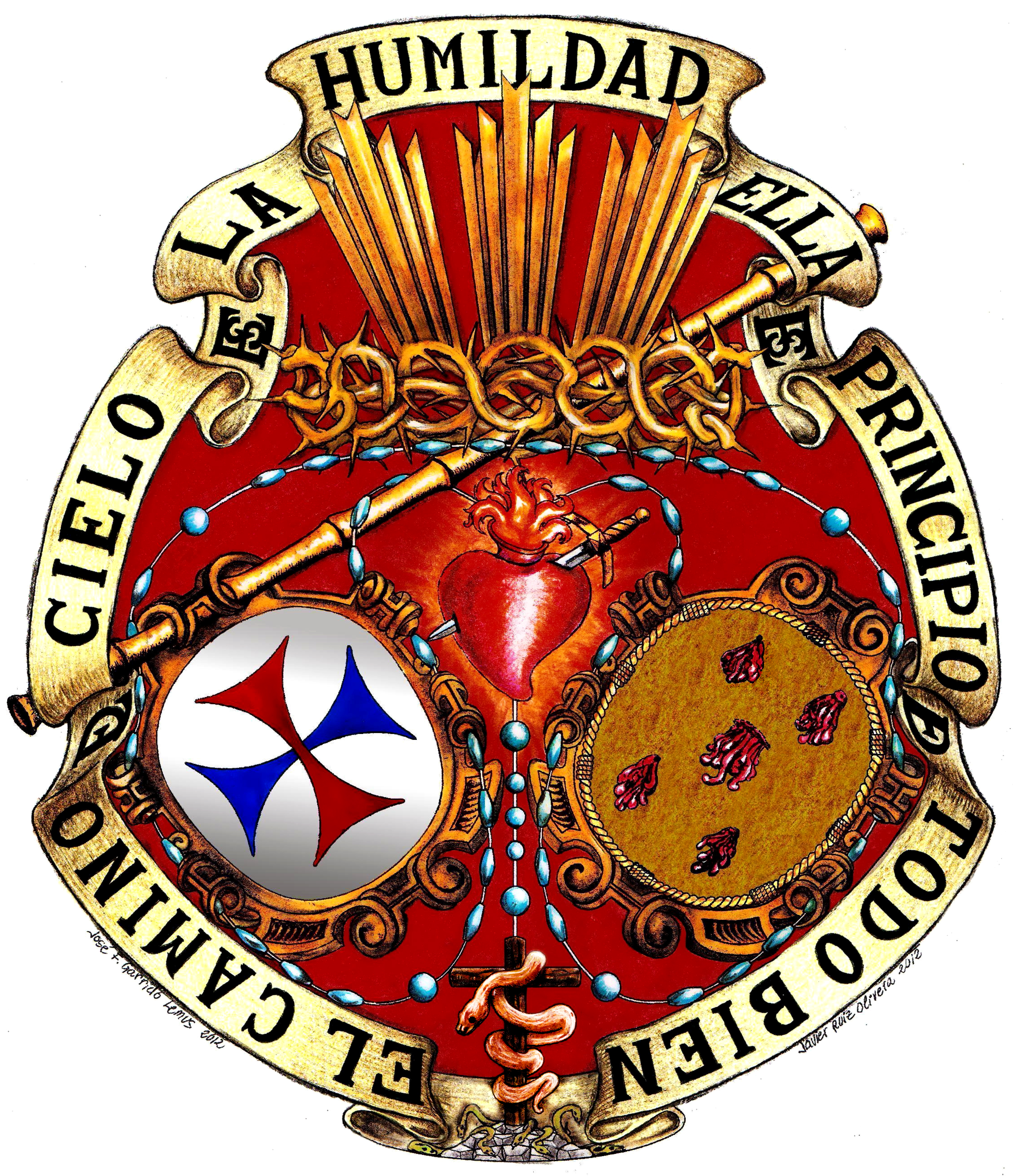 Emblema para la celebración del 450 aniversario fundacional (1563-2013) de la Ilustre Cofradía de la Humildad de Nuestro Señor Jesucristo y Nuestra Señora de los Dolores del Rosario de Baeza (Jaén).